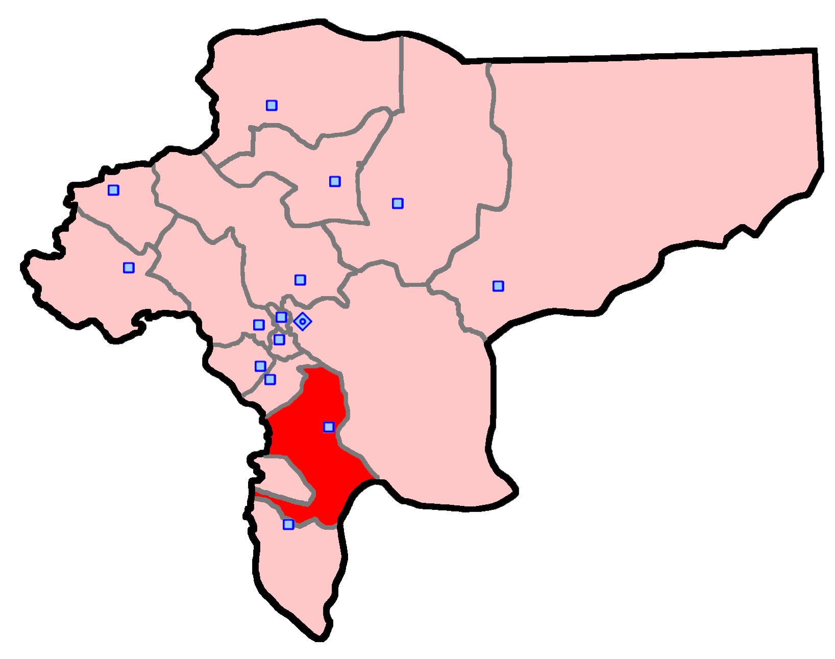 حوزهٔ انتخاباتی شهرضا و سمیرم سفلا برای انتخابات مجلس شورای اسلامی